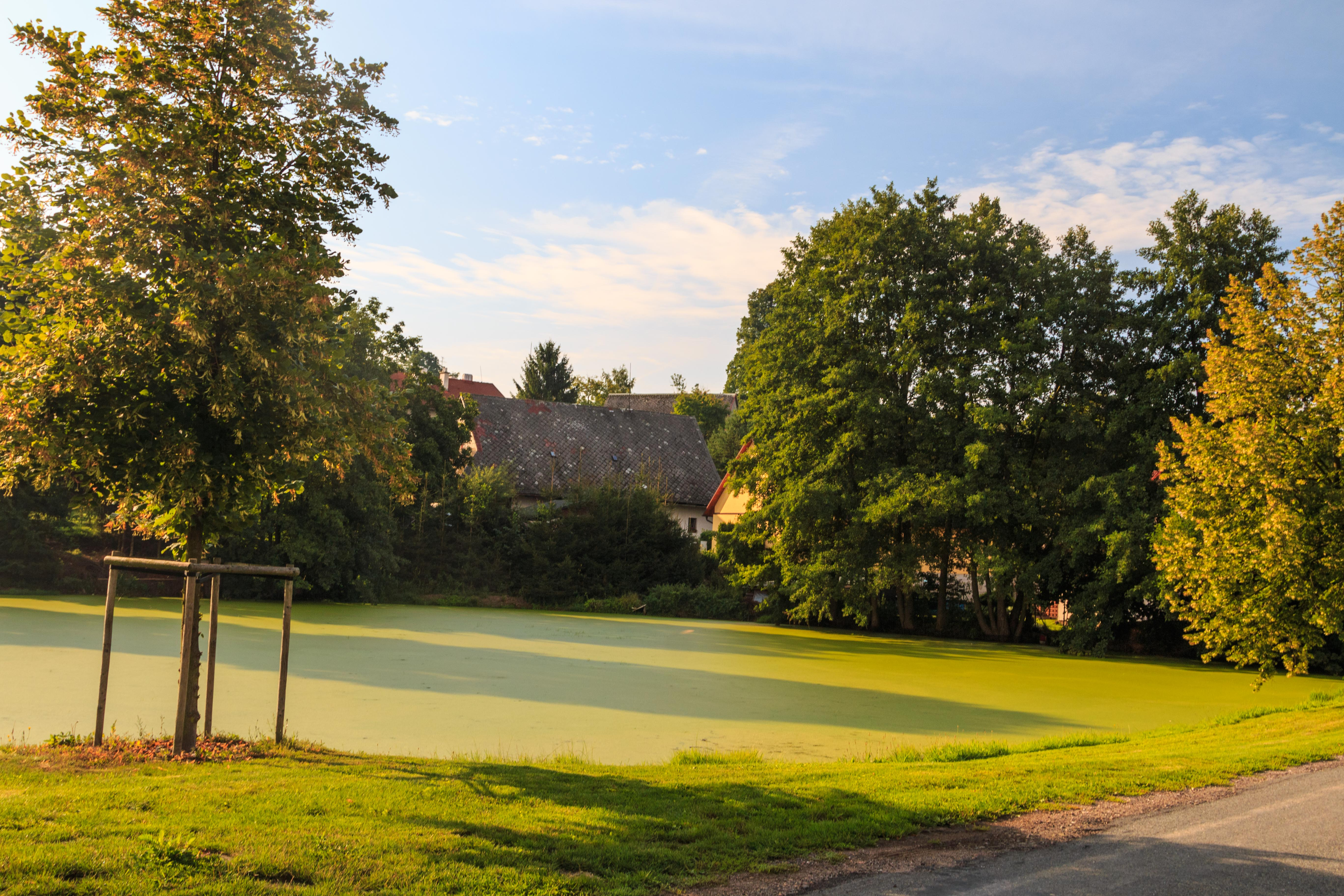 Návesní rybník v Přívratu